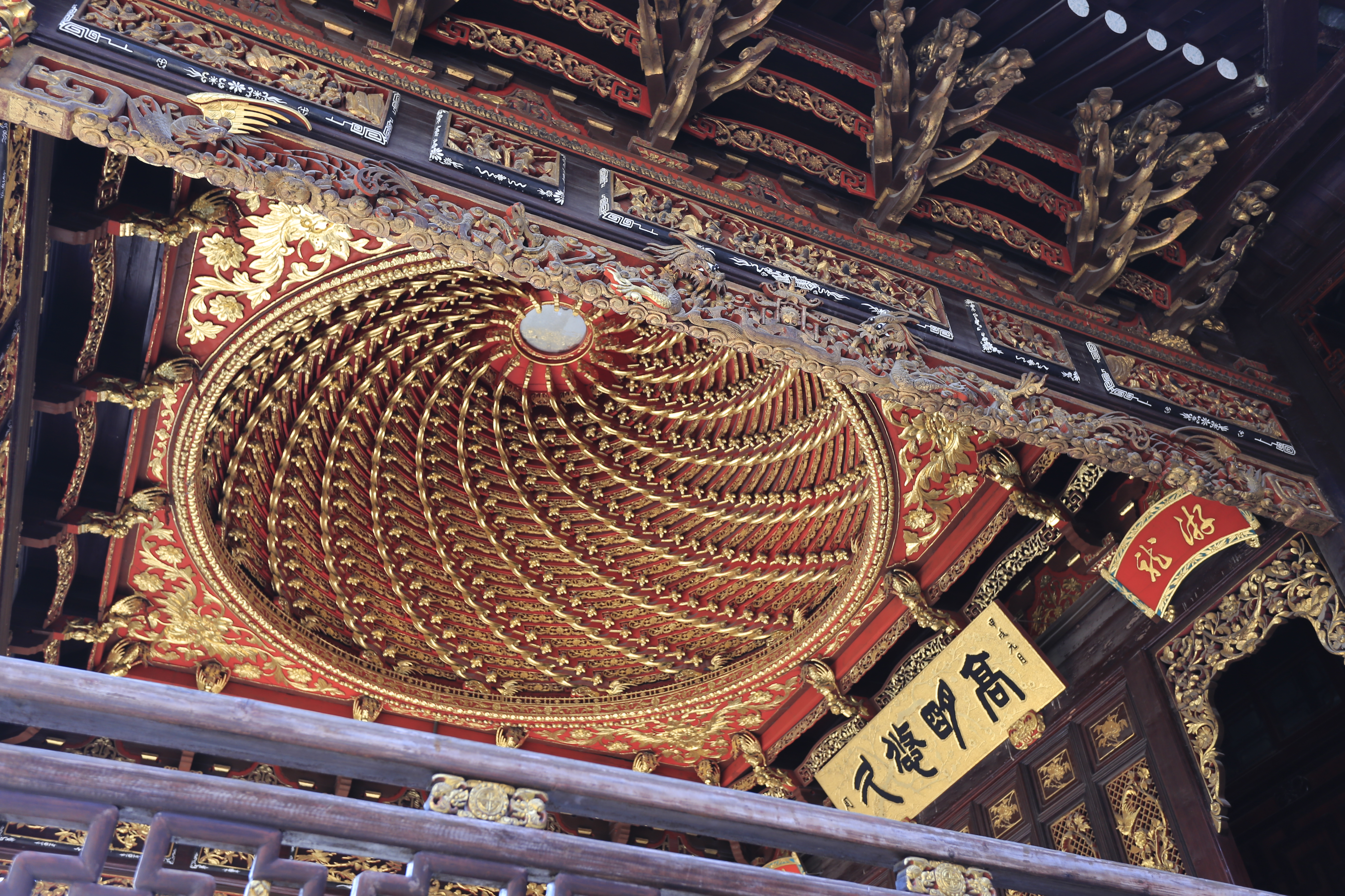 宁波天一阁 —— 秦氏支祠戏台